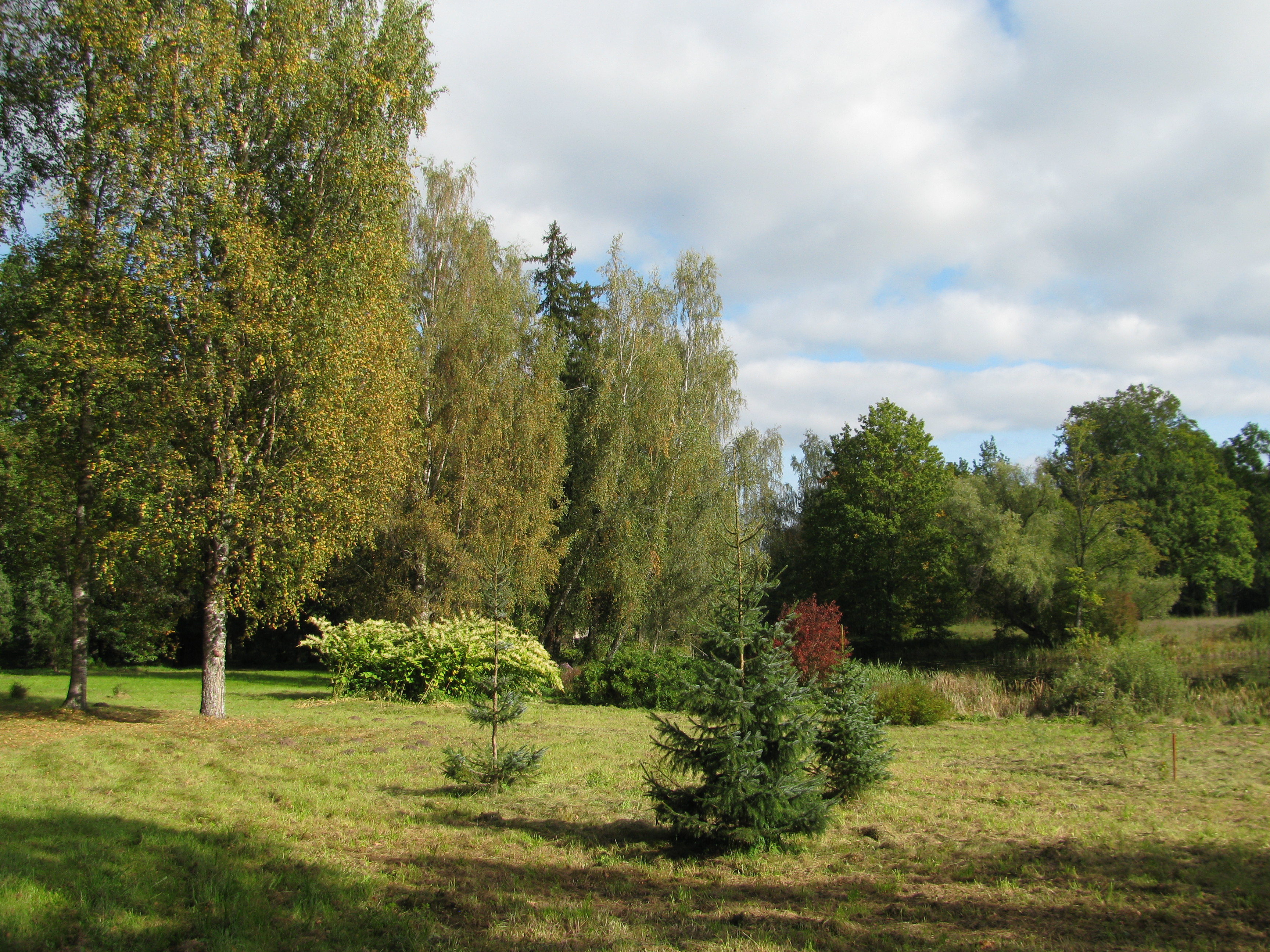 Parks, Trapenes pagasts